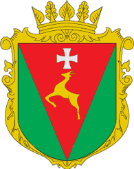 Герб Сарненського району